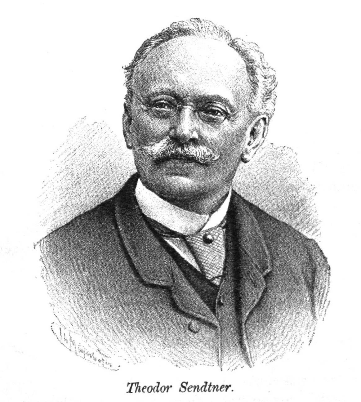 Theodor Sendtner aus Zeitschrift des Deutschen und Oesterreichischen Alpenvereins 1894 Band 25